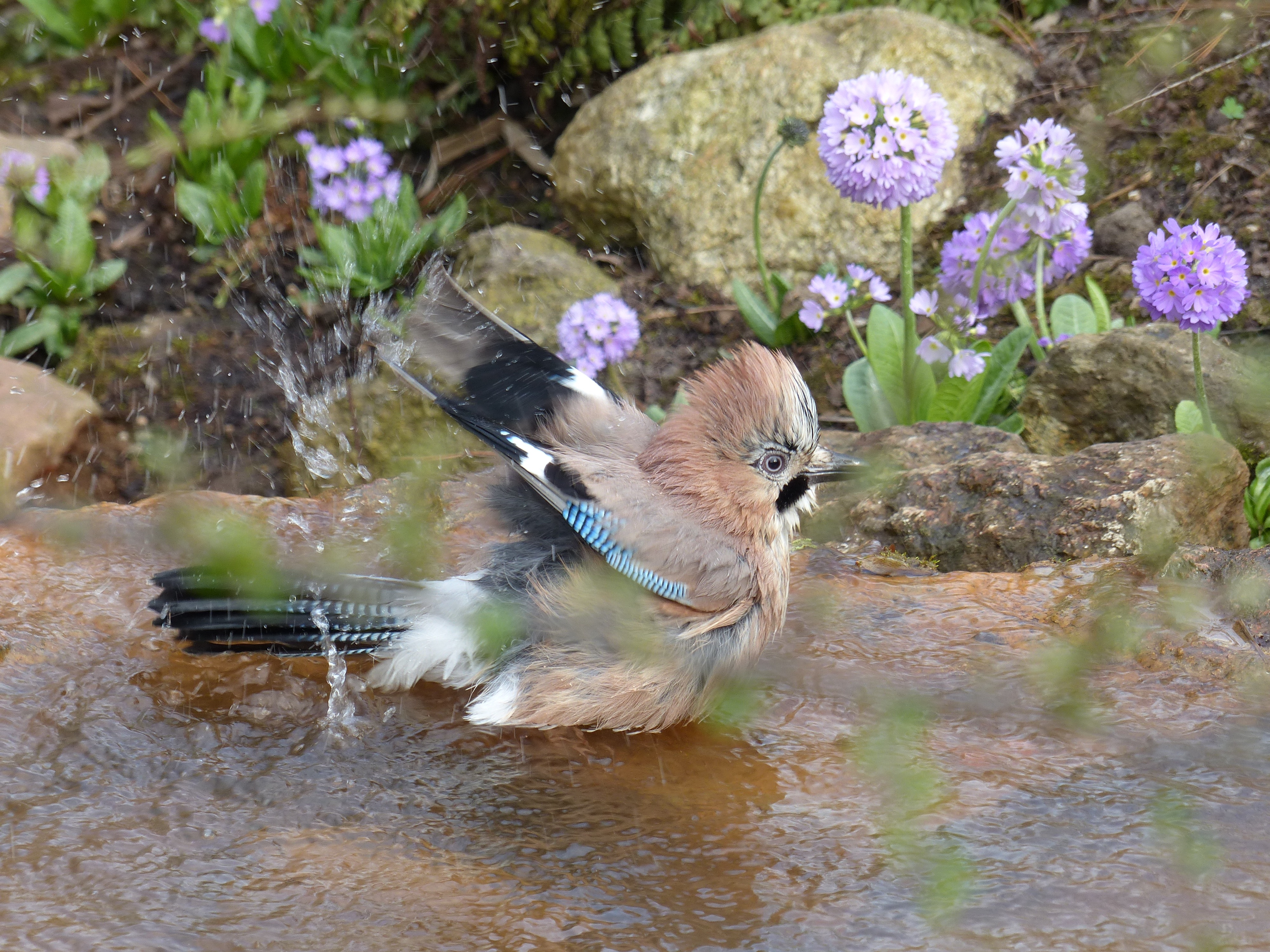 Eichelhäher beim Baden im botanischen Garten Berlin